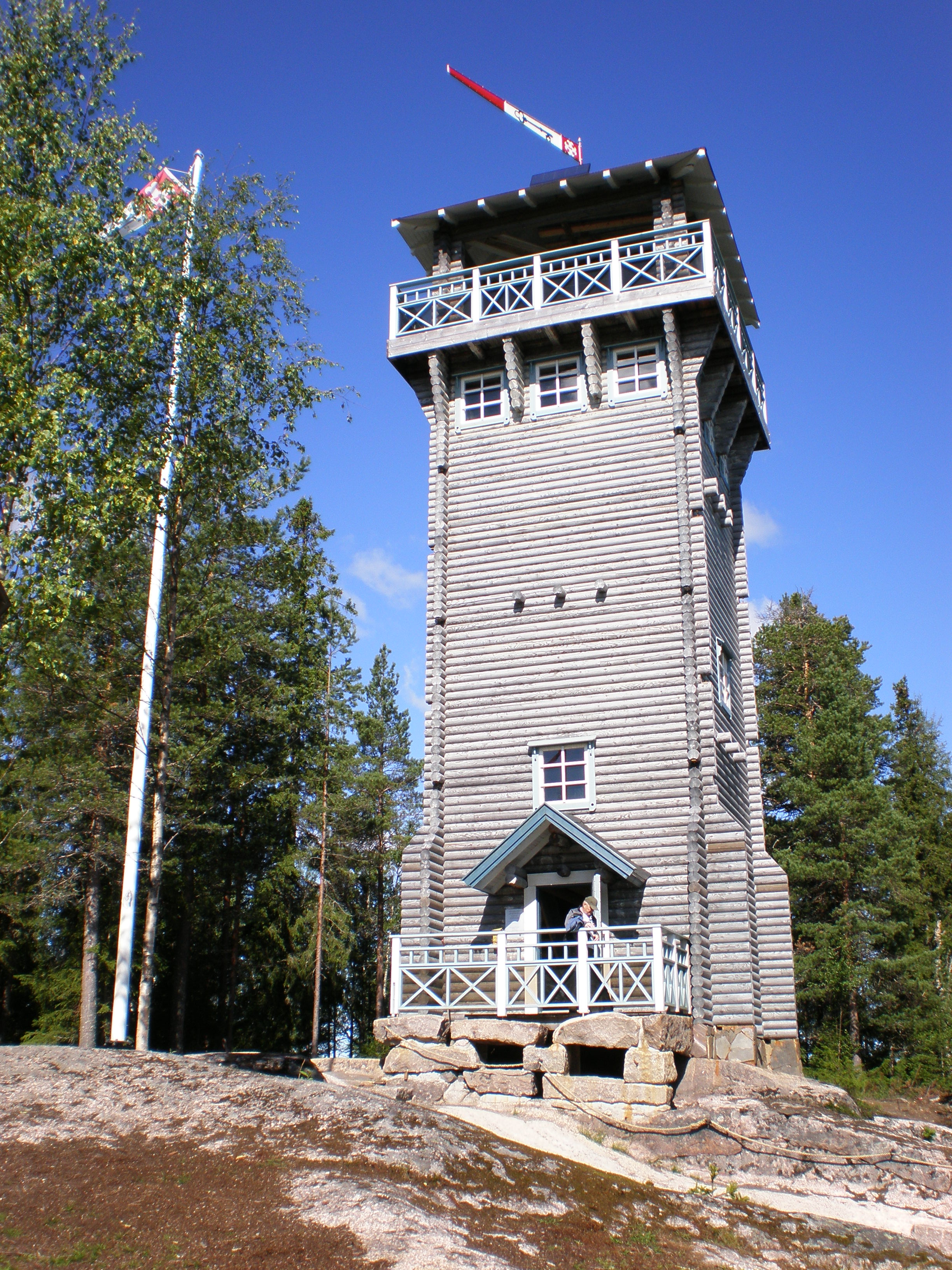 Aussichtsturm in Karstula (mit Freilichtkirche und überdachtem Grillplatz)